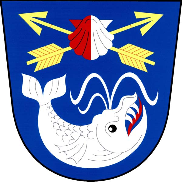 Znak obce Kratonohy